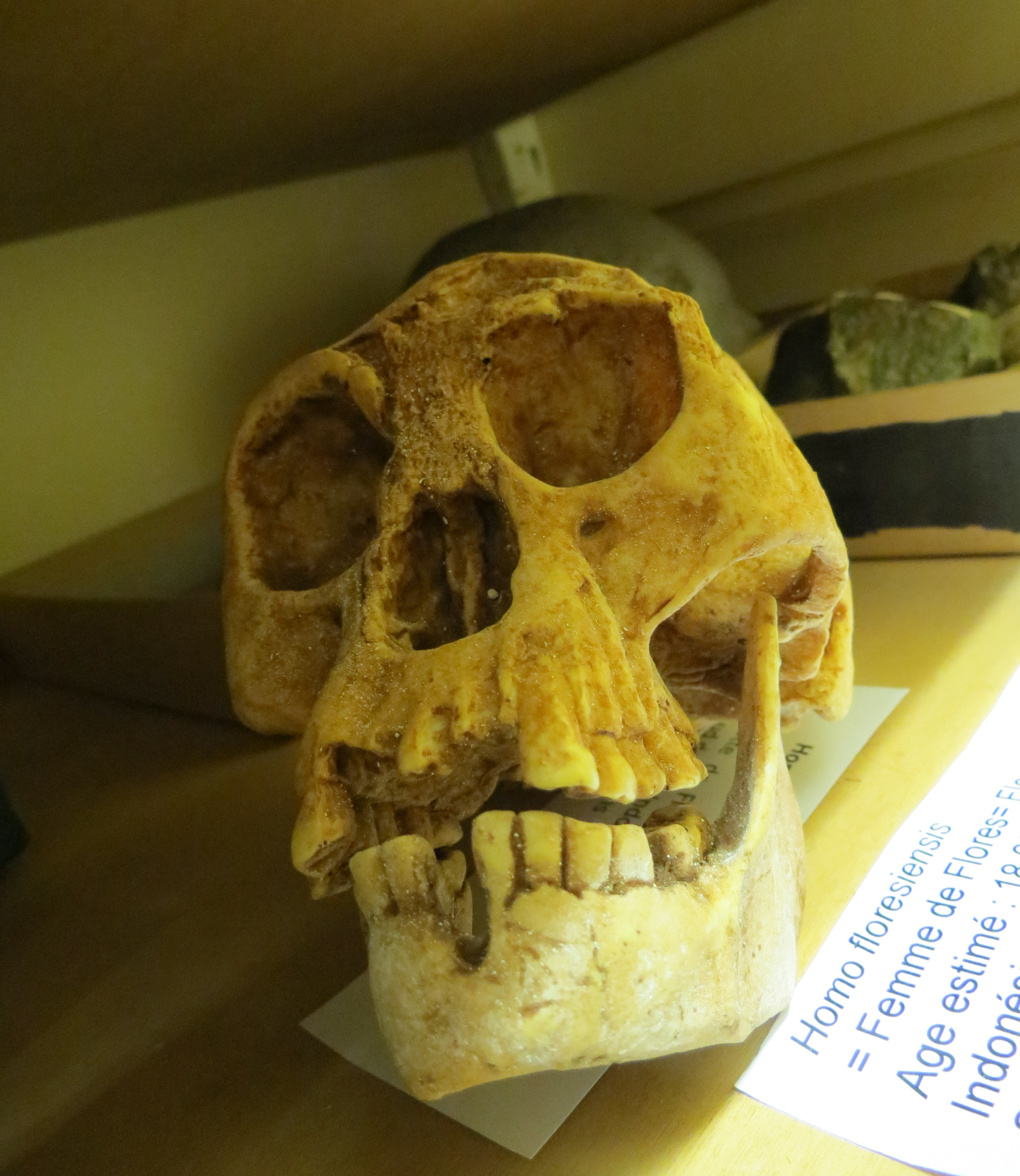 Age estimé : 18 000 ans Provient d'Indonésie : Flores, grotte de Liang Bua